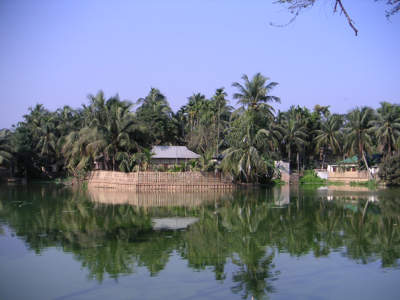 Agartala, Tripura. Photo: Soman